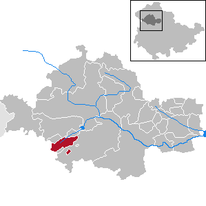 Kammerforst in Thuringia - Unstrut-Hainich-Kreis